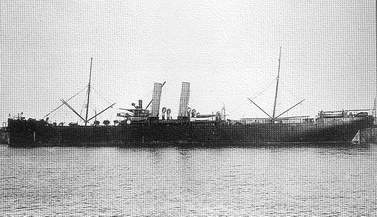 Transporte ARA Chaco